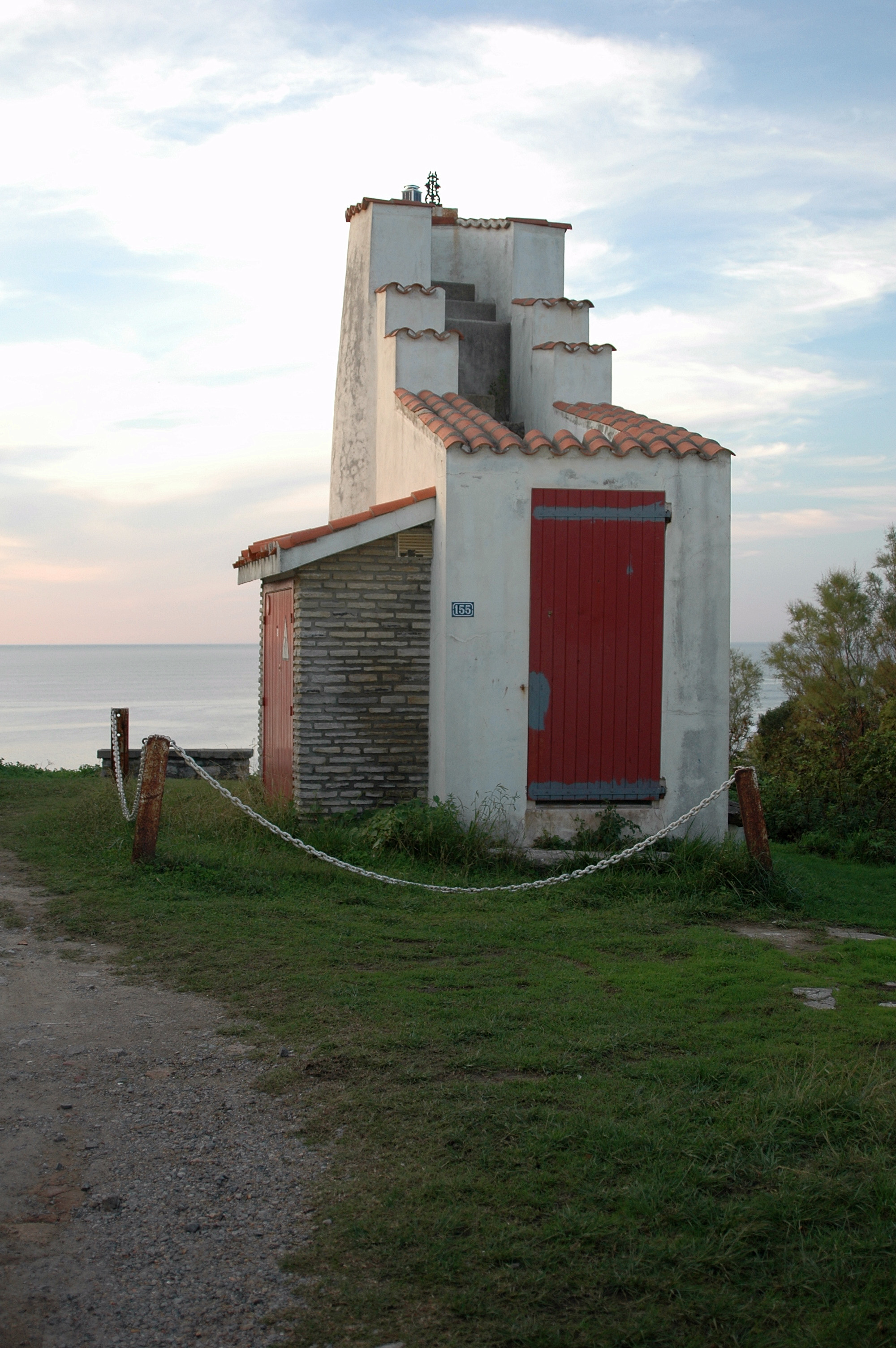 Guéthary, le sémaphore. Photo prise le 15/10/06 par Harrieta171